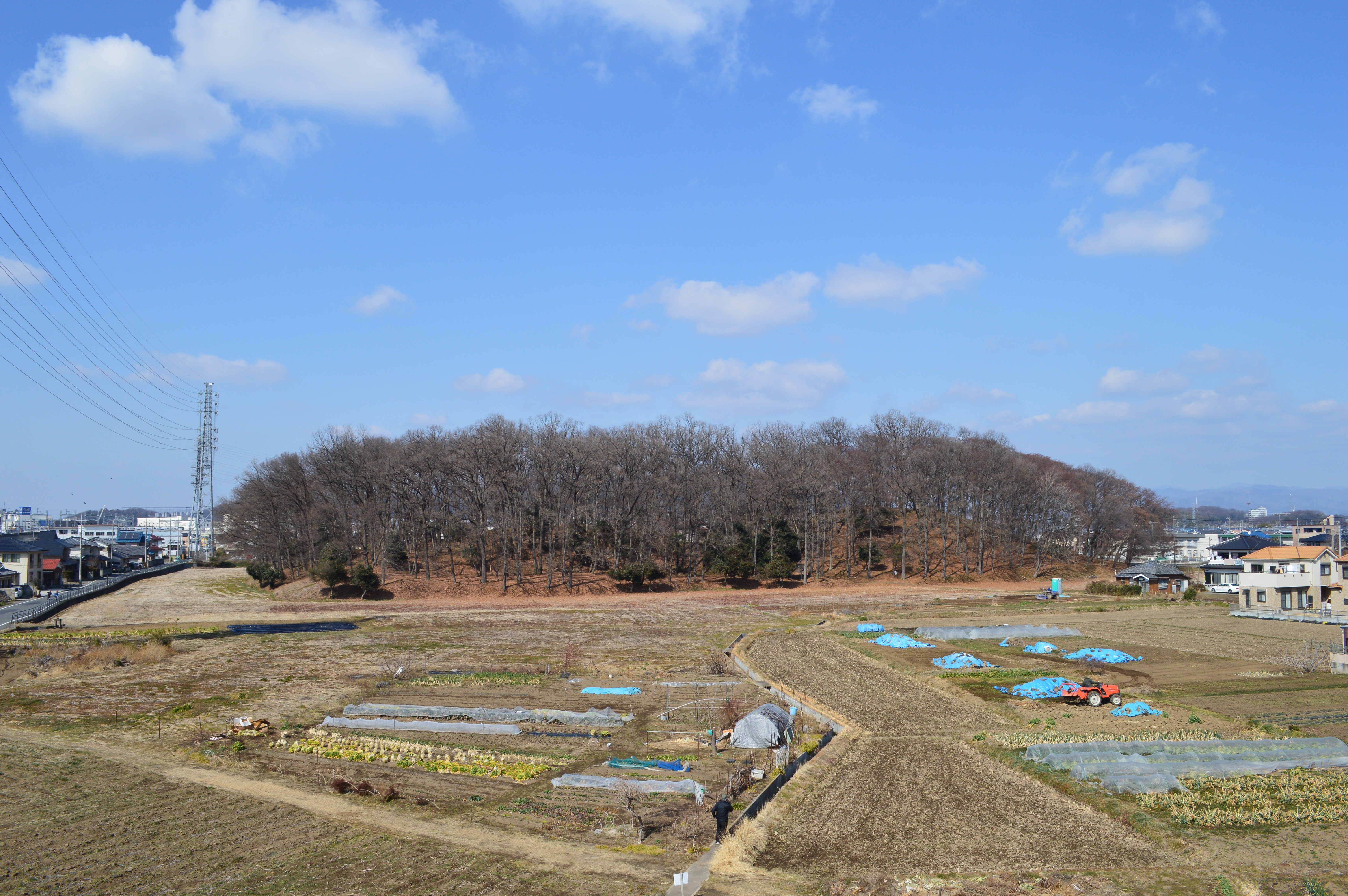 太田天神山古墳 全景